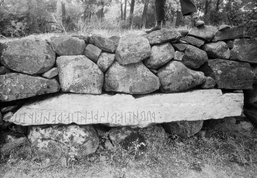 Kyrkobalkens utsida, åt söder. Kategori: (01) Exteriörer, detaljer Kyrkobalkens utsida, åt söder.